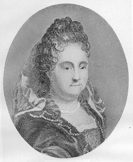 Anne Dacier (1654–1720), französische Philologin. Stich von Gaillard, nach einem Gemälde von Ferdinand (aus Dreux du Radier, L'Europe illustre VI, 1777)